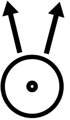 Топографическое обозначение долговременной огневой точки на топографических картах. Взято из Справочника командира взвода управления батареи дивизионной артиллерии. — Москва: Военное издательство Народного Комиссариата Обороны, 1943.